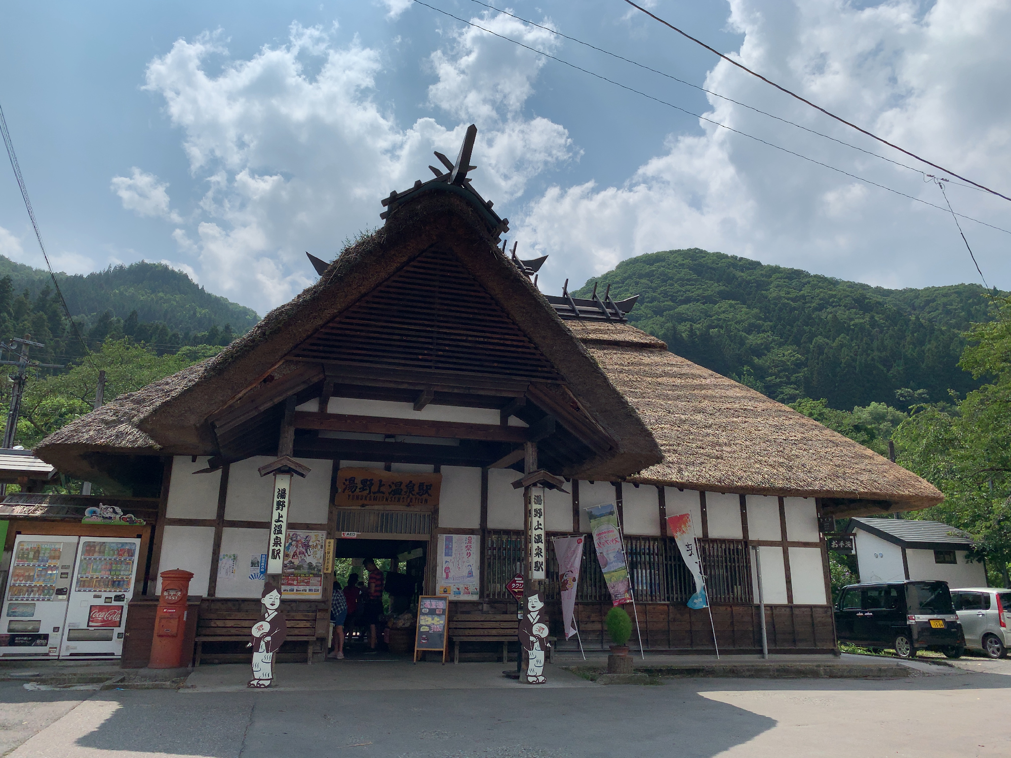 会津鉄道 湯野上温泉駅 駅舎